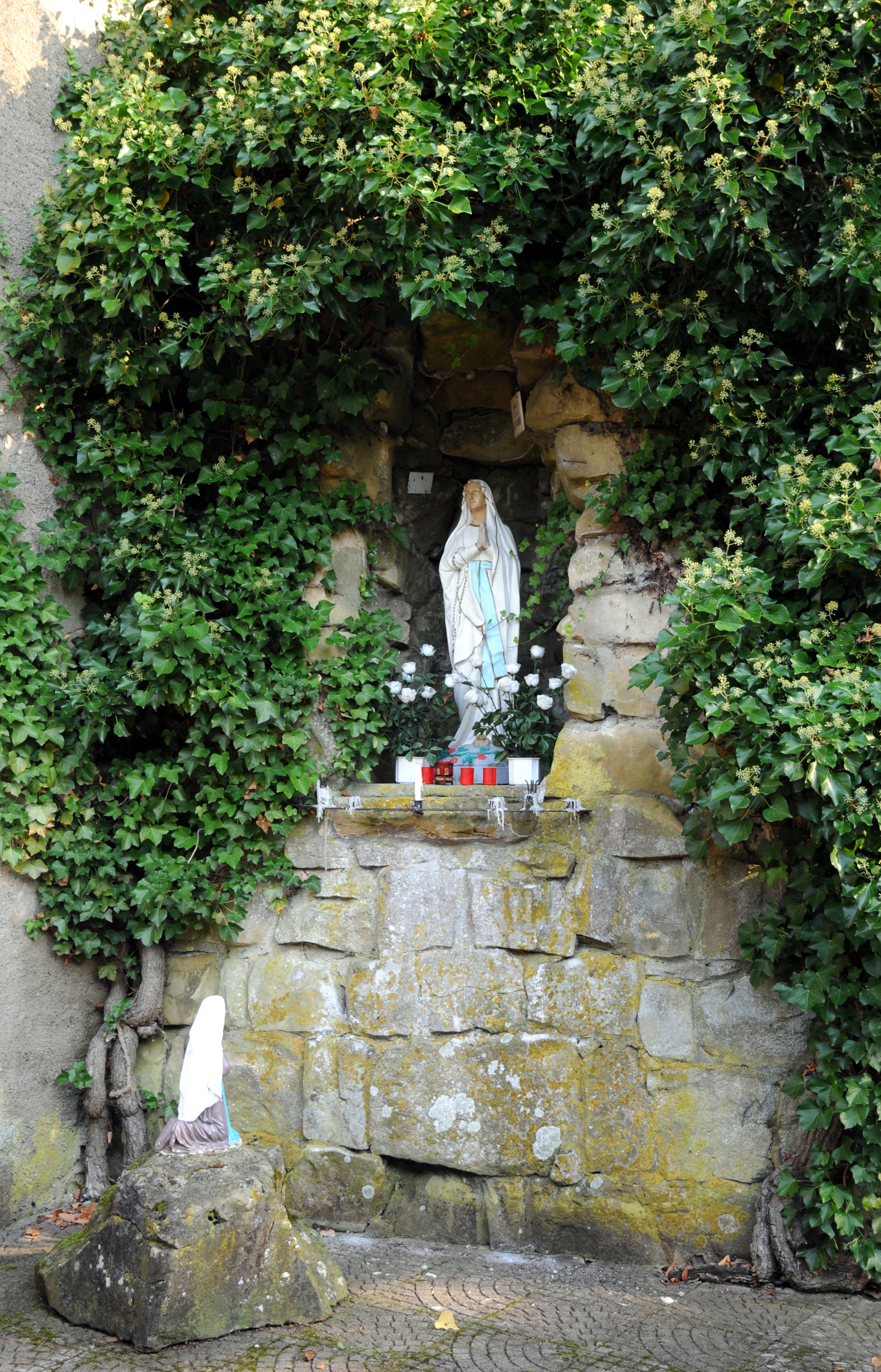 D'Lourdes-Grott bei der Kapell vum Kaaschtel.